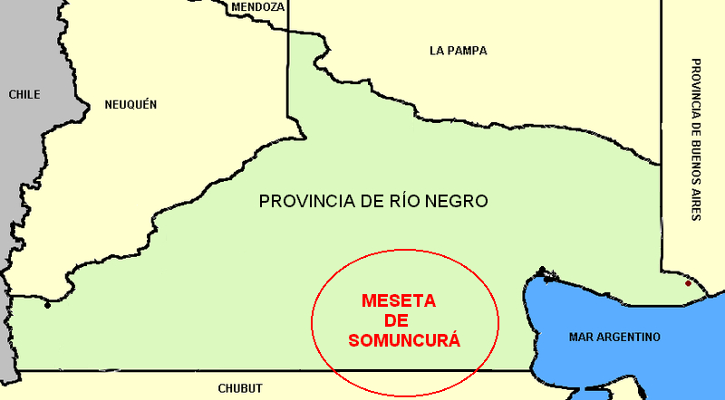 Mapa de la Meseta de Somuncurá